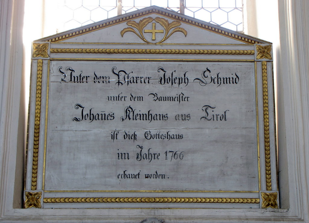 Gedenktafel über dem Südportal der Pfarrkirche in Denklingen